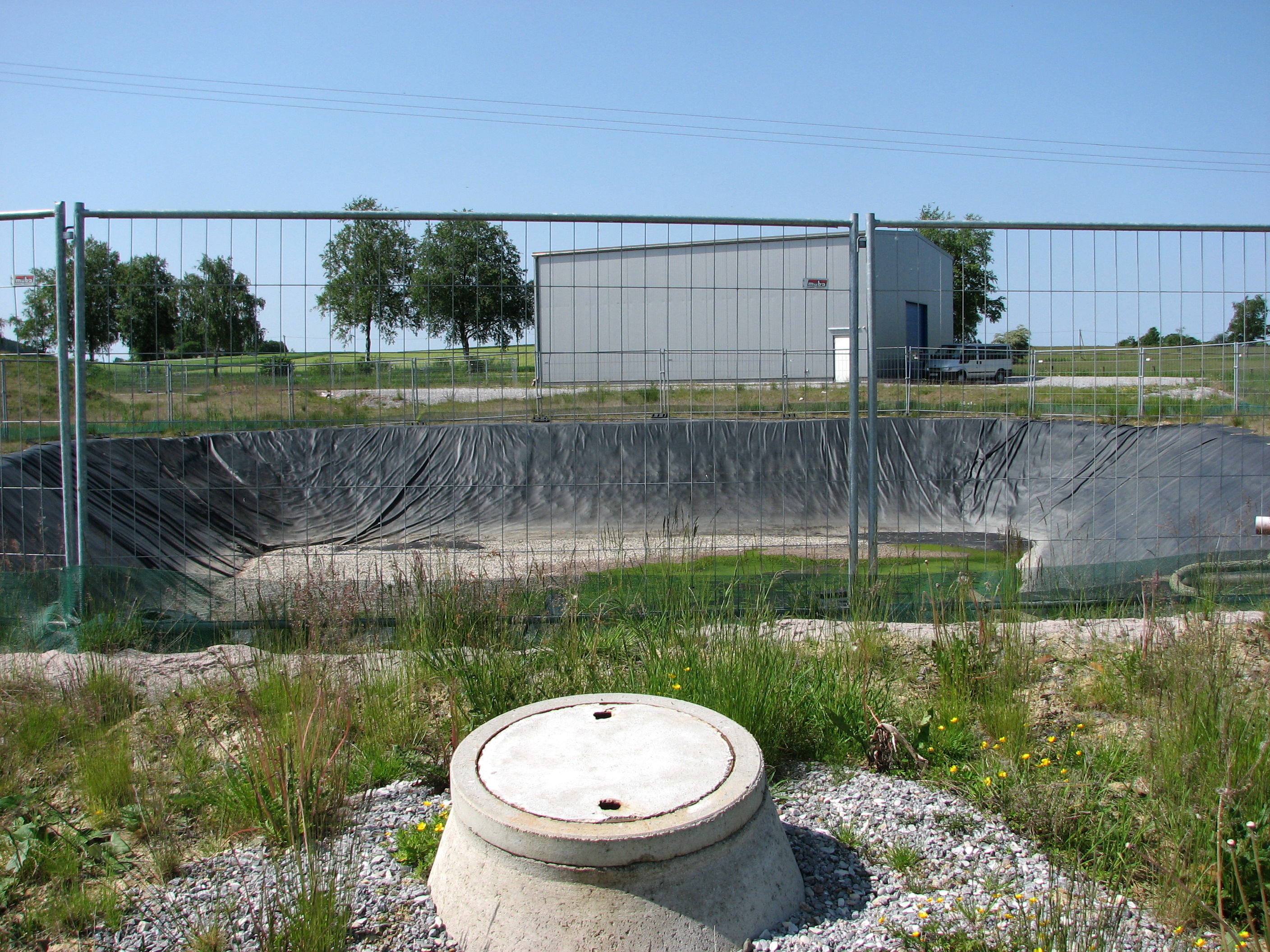 Drainagesammelbecken der mit perfluorierten Tensiden belasteten Fläche in Brilon-Scharfenberg, im Hintergrund die Aktivkohle-Behandlungsanlage (Bericht)